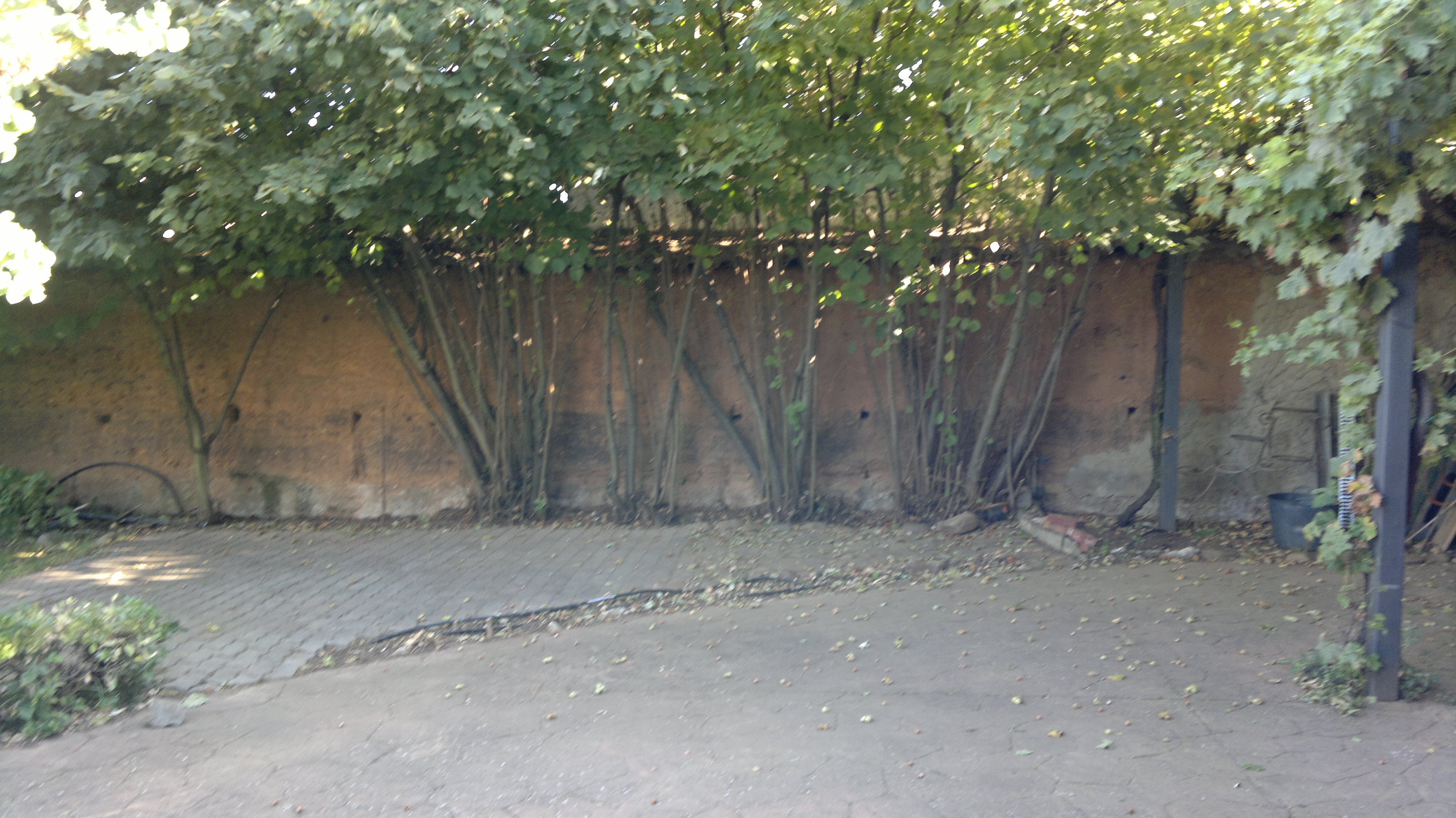 Tapia de adobe en la localidad de Benamariel (León-España). Las tapias de Adobe eran construcciones frecuentes para delimitar huertos y espacios rurales.